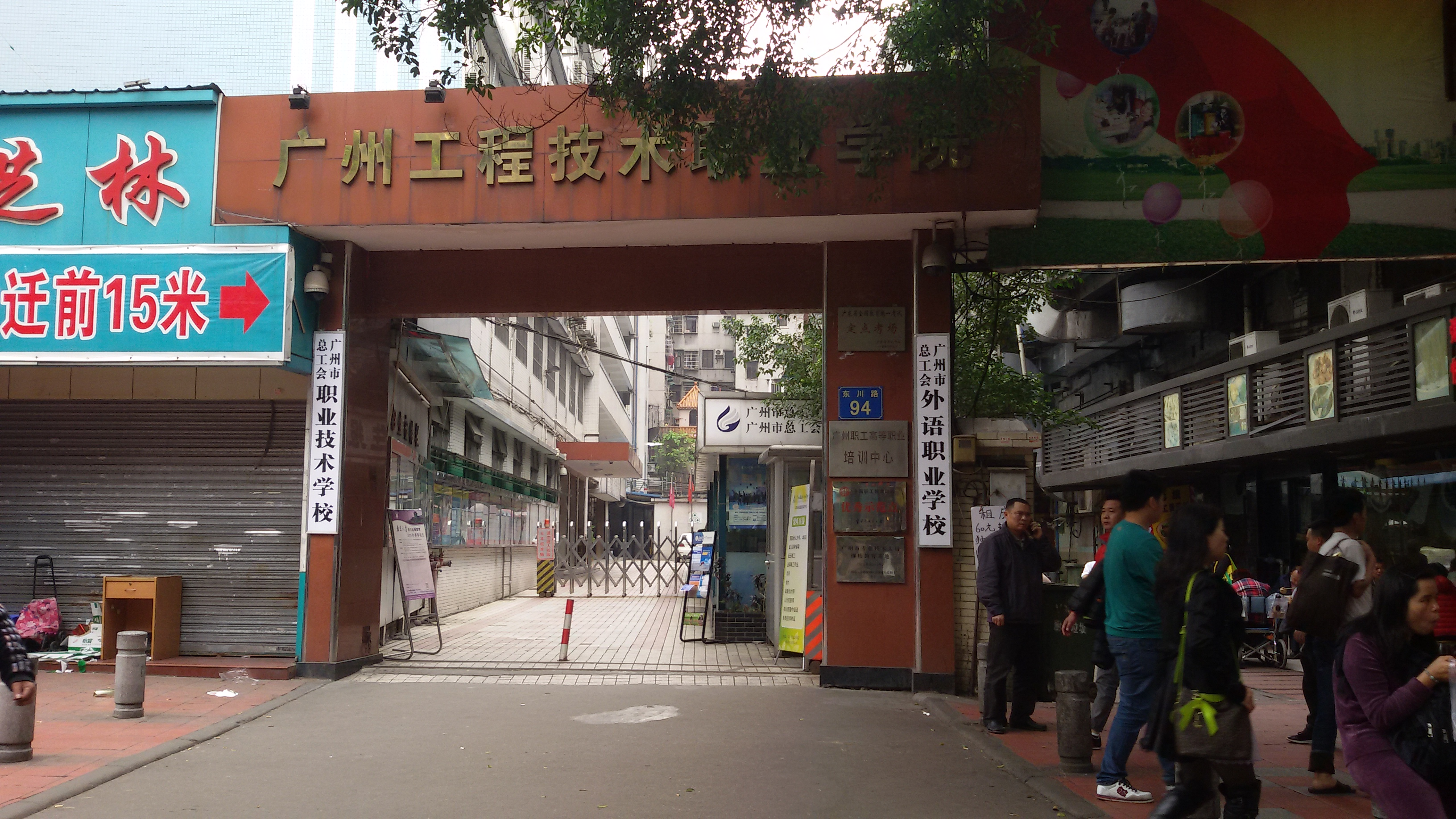 粵語: 廣州市總工會（外語）職業技術學校嘅東川校區